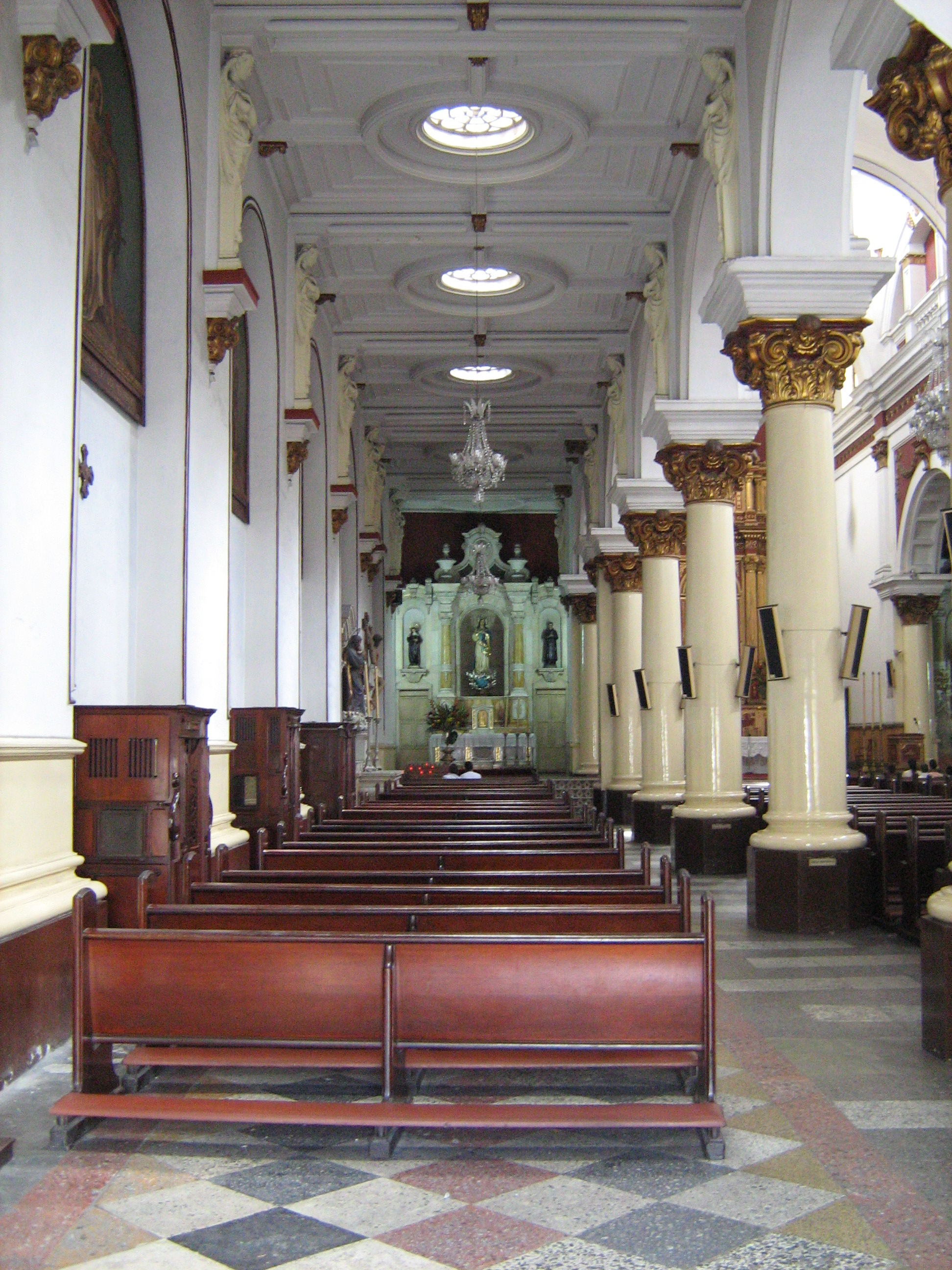 Iglesia de San Ignacio, Medellín, Colombia.